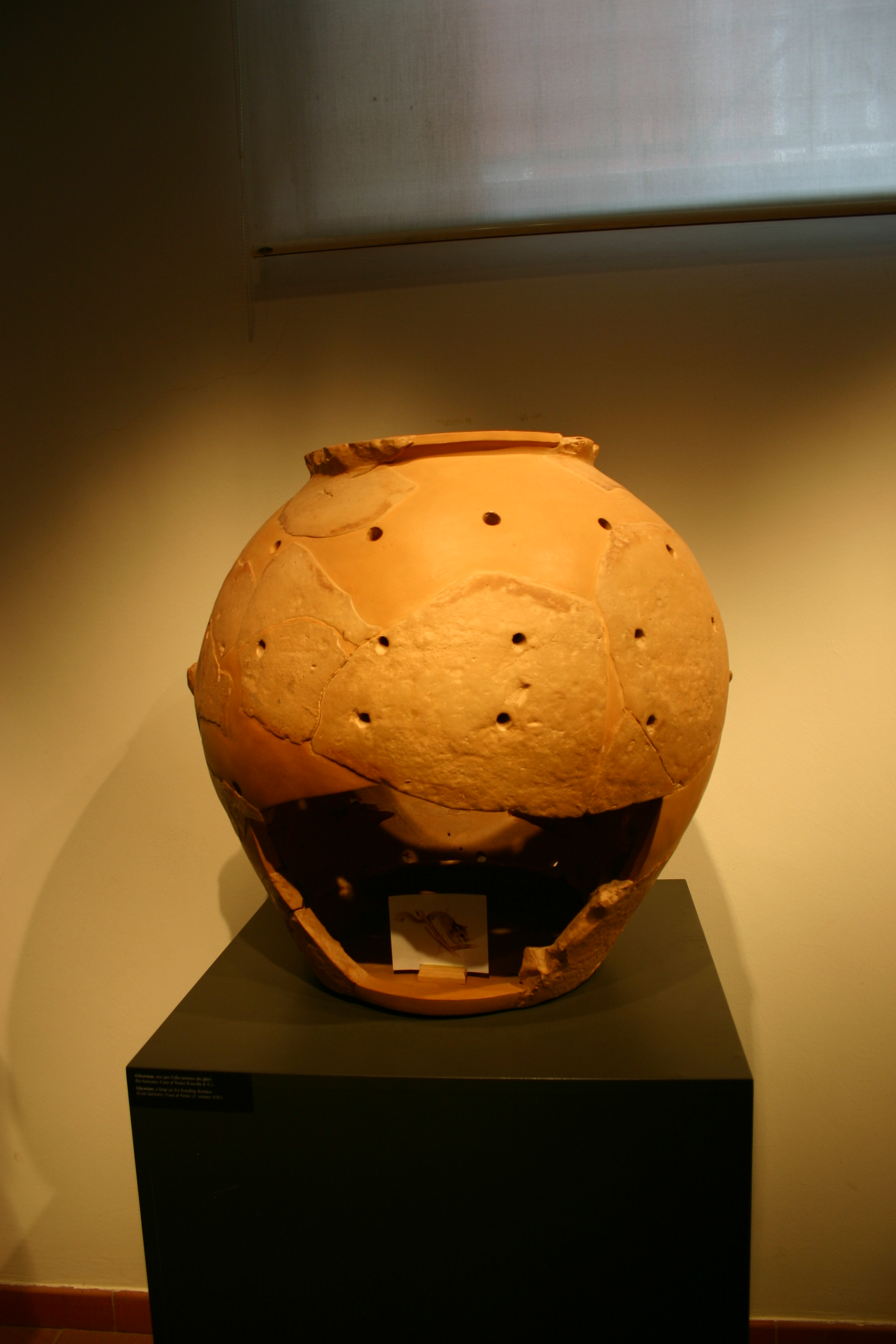 Museo archeologico nazionale di Chiusi - Glirarium, contenitore per allevare i ghiri